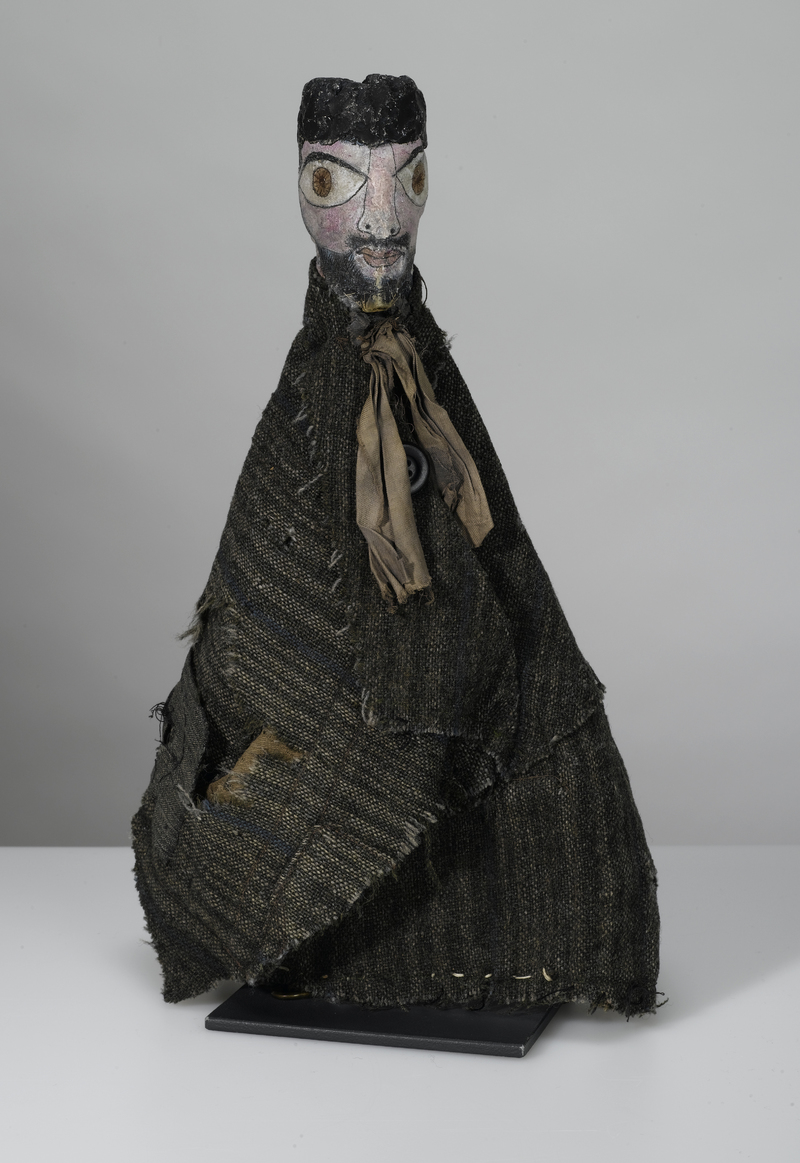 Paul Klee, Handpuppe Ohne Titel (Selbstportrait), von 1922, Höhe 38 cm, Zentrum Paul Klee, Bern, Schenkung Livia Klee